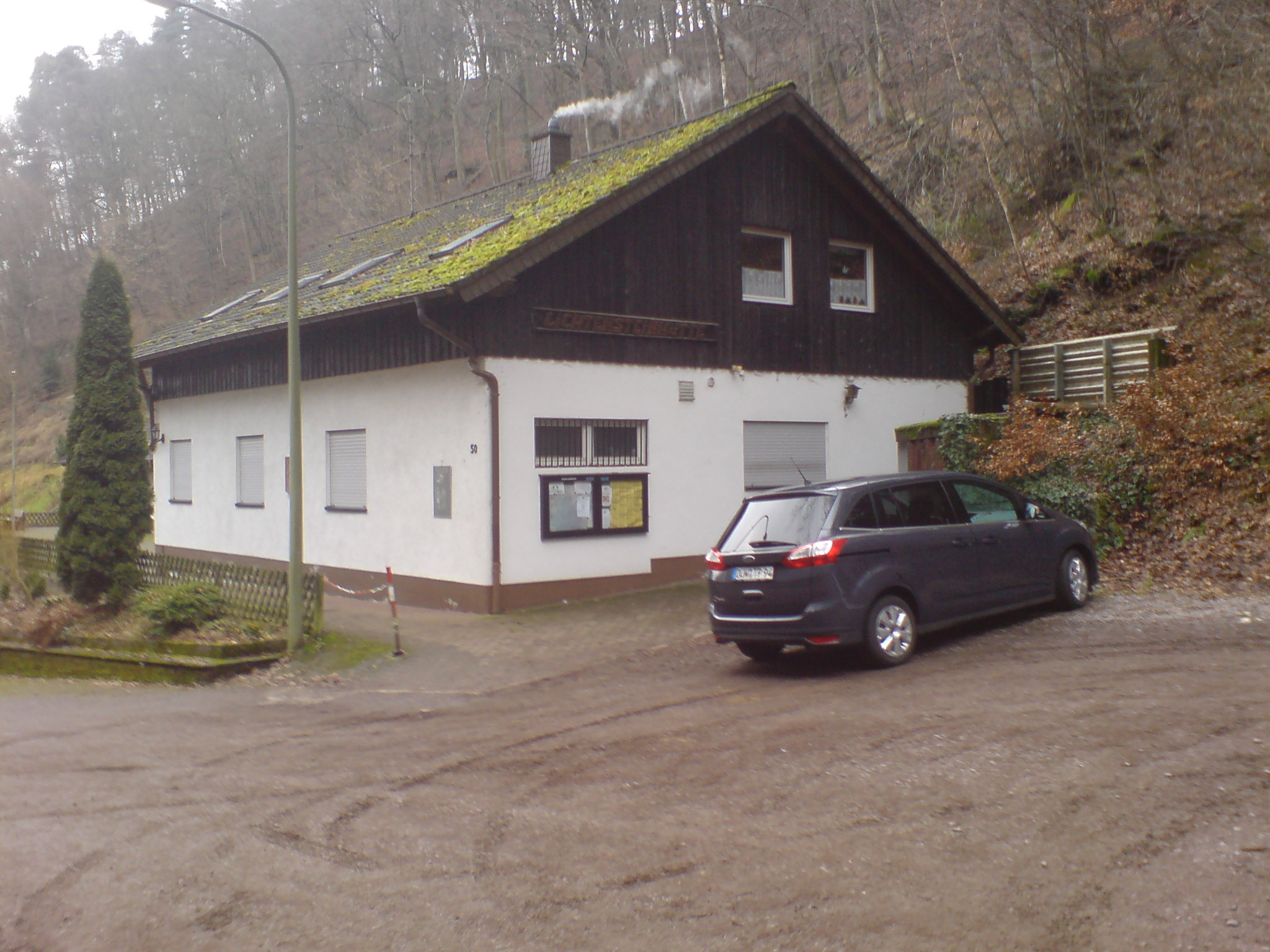 Die Lichtenstein-Hütte in Neidenfels.